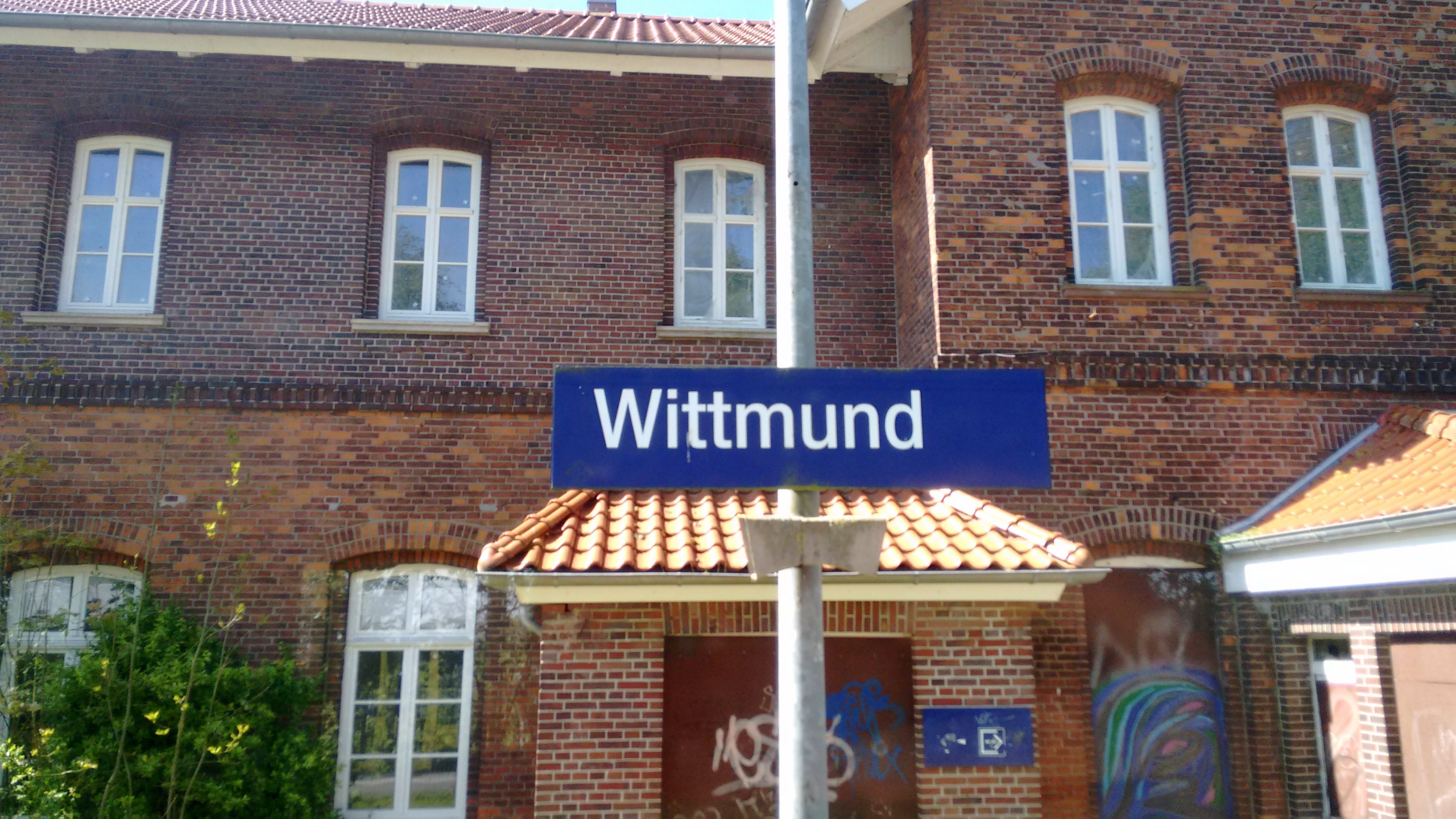 Bahnhofsschild Wittmund